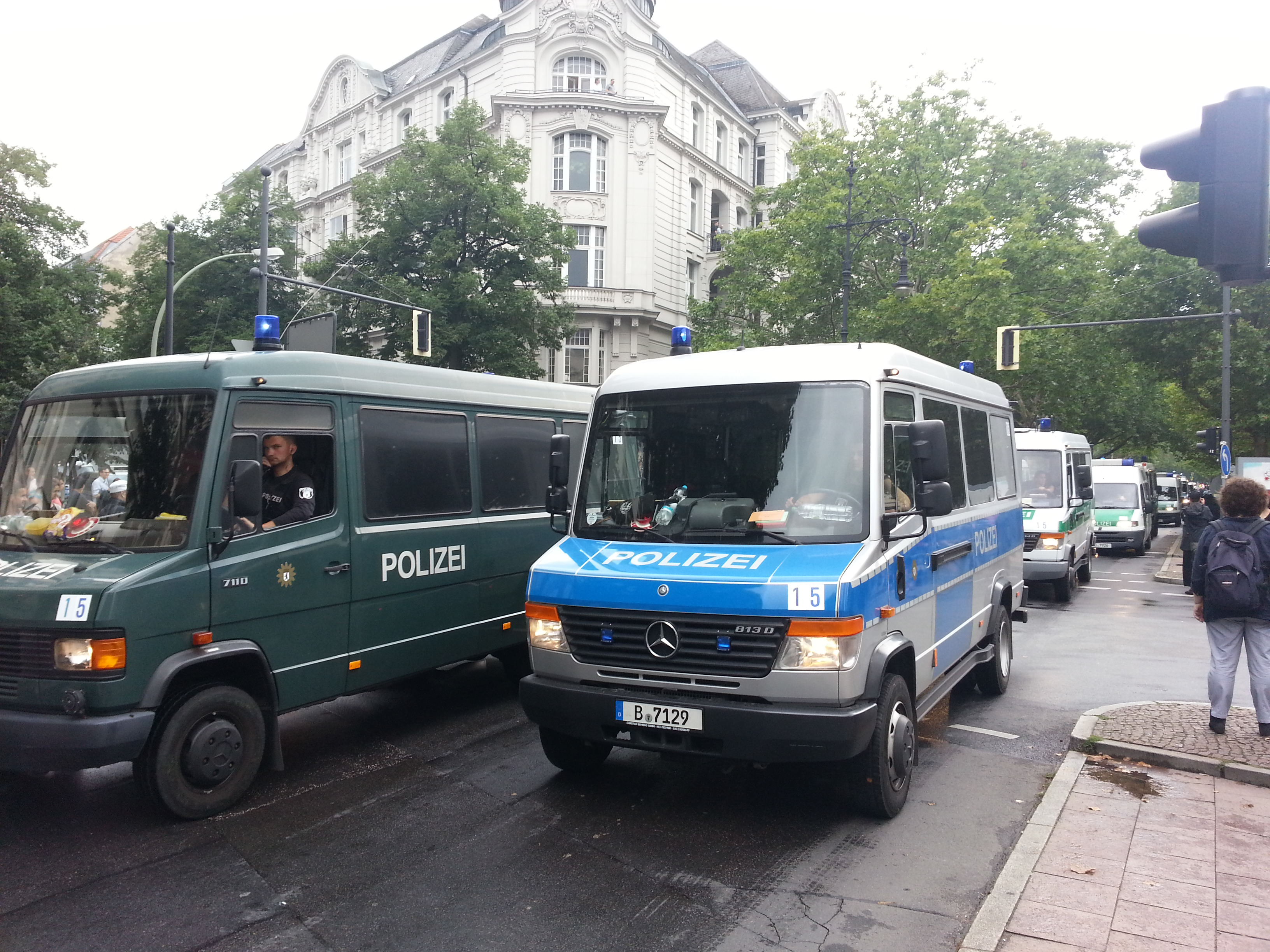 Demonstration Al-Quds 2014 Berlin Kurfürstendamm - Polizei